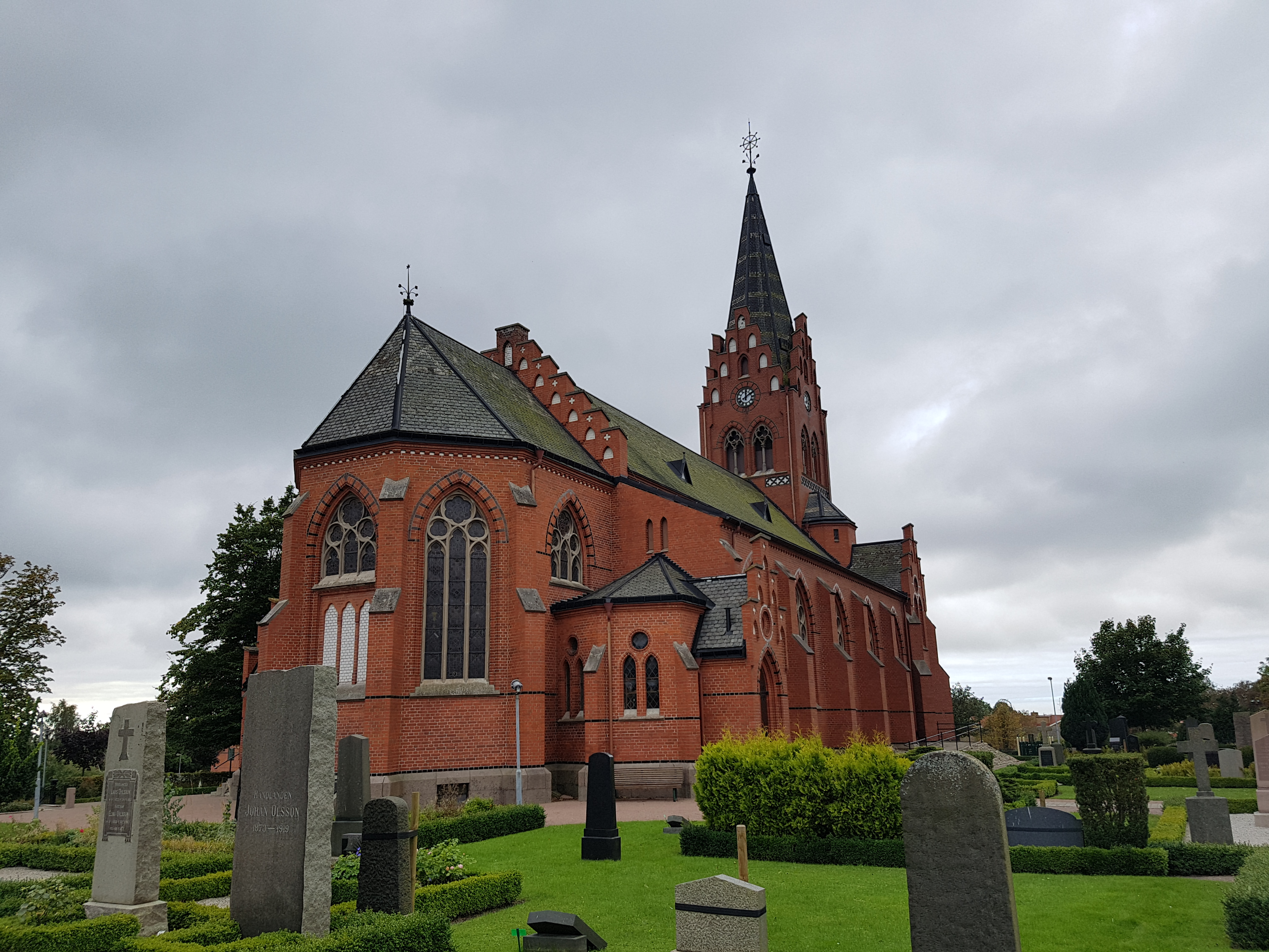 Tygelsjö kyrka (Tygelsjö 41:39)